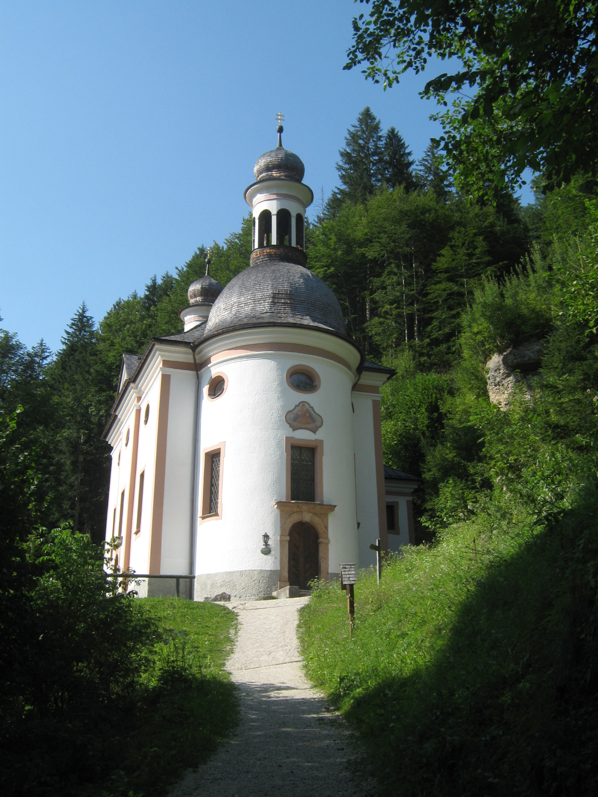 Wallfahrtskirche Maria Himmelfahrt am Kunterweg in Ramsau bei Berchtesgaden, Oberbayern (Maria Kunterweg), Eingangsseite (von Osten)